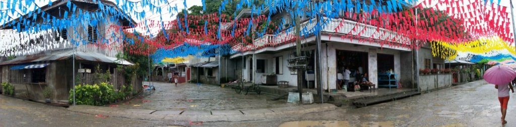 Tabo in Libjo